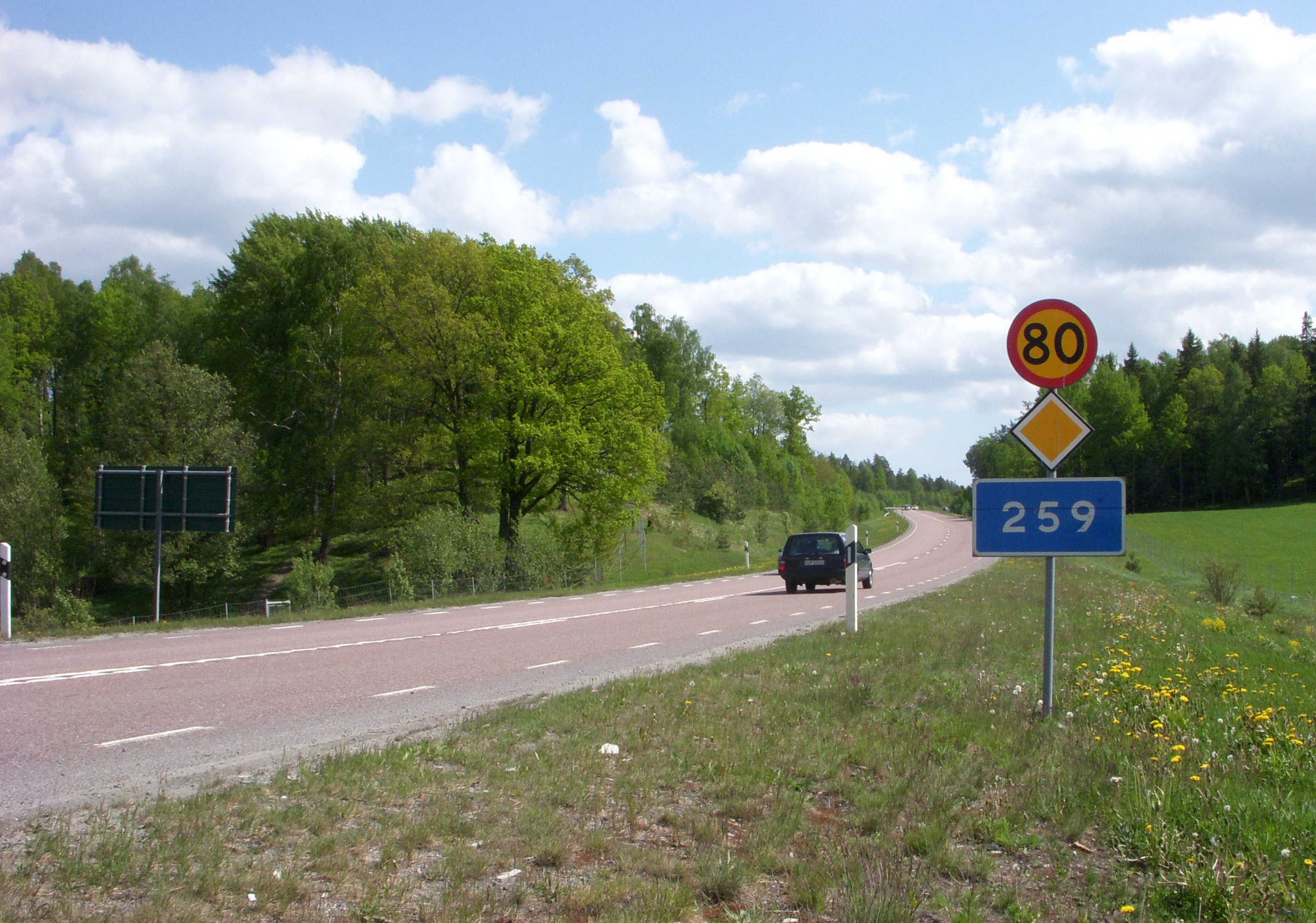 Södertörnsledens utbyggda del strax öster om Gladö kvarn